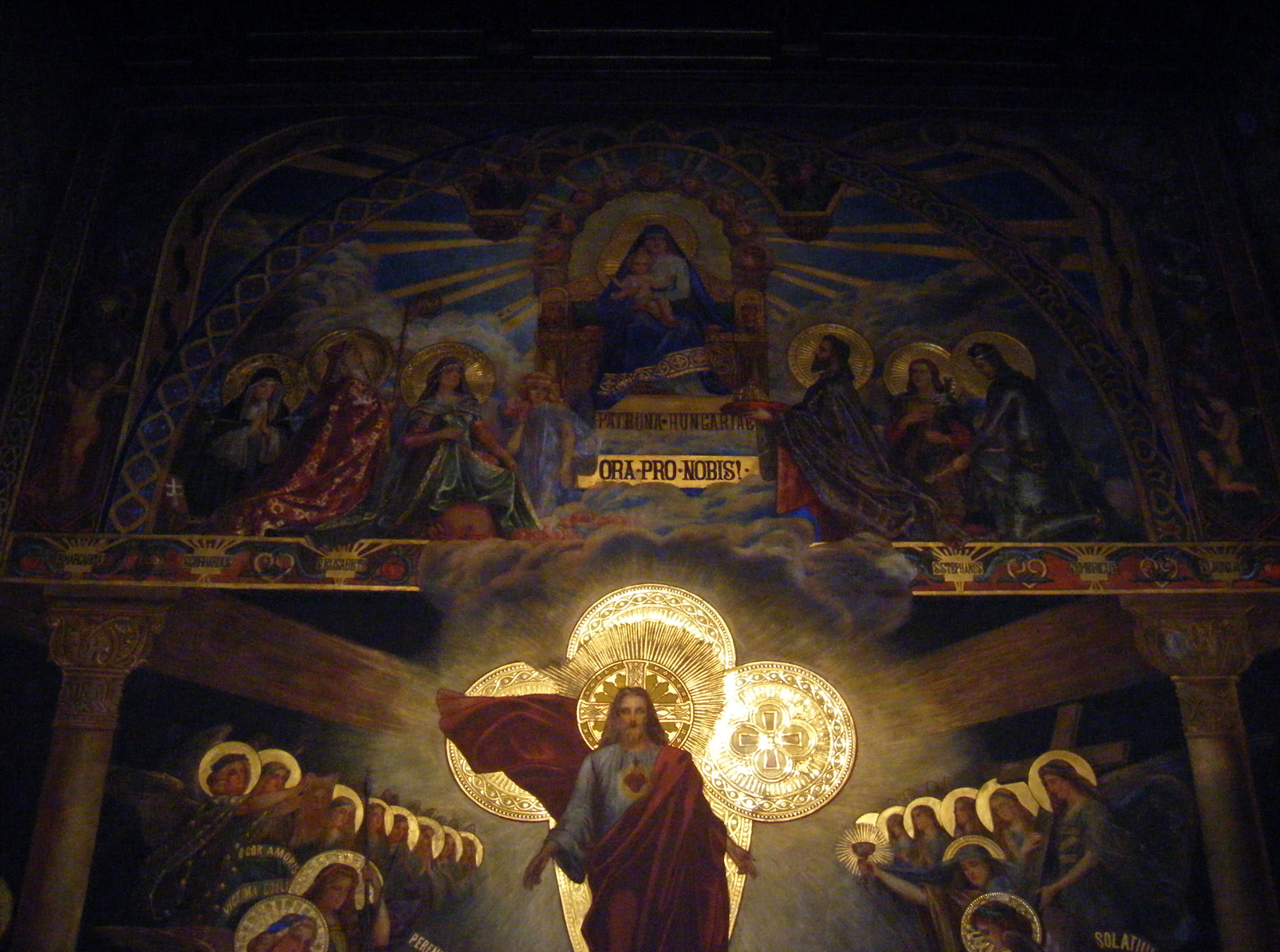 Pázmáneumi kapelle